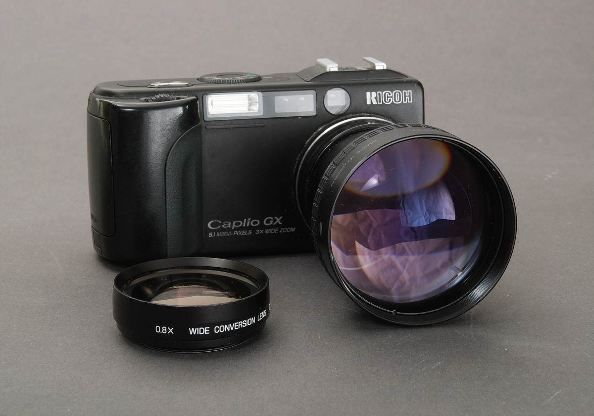 Ricoh Caplio GX Digitalkamera mit montiertem Sony-Televorsatz 2x, daneben der Ricoh DW4 Weitwinkelvorsatz